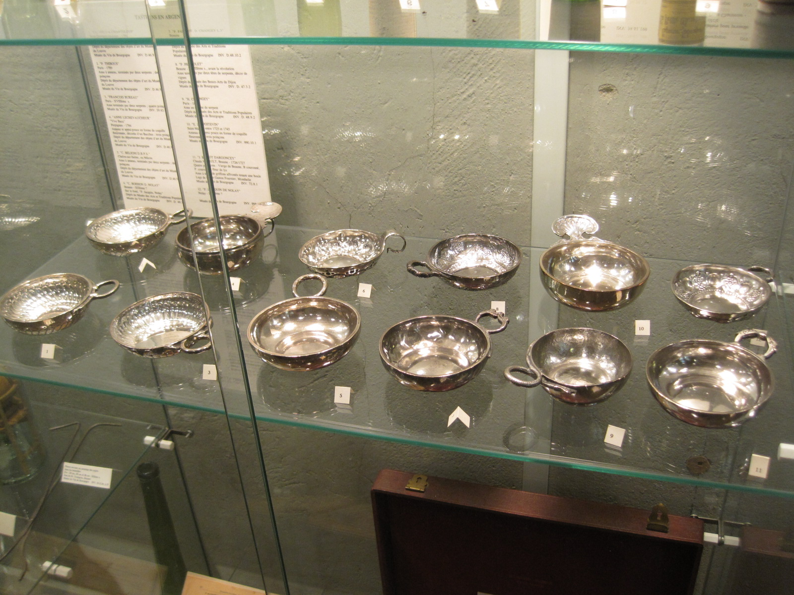 Hôtel des ducs de Bourgogne (Beaune)